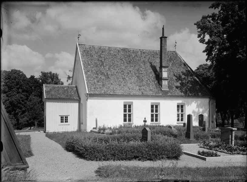 Kyrkan mot söder.